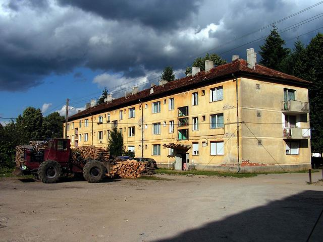 Szocalizmus korabeli bányászlakótelep Vársonkolyoson